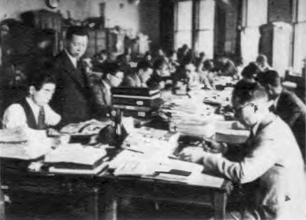 警視庁検閲課の様子。1938年（昭和13年）。